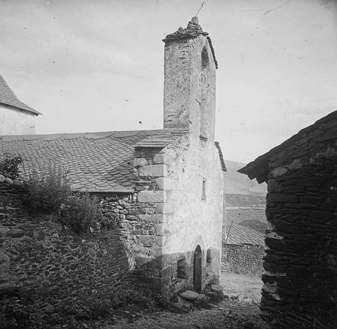 Campanar de l'església de l ' Esperança de Bolvir. Josep Salvany i Blanch (1923)